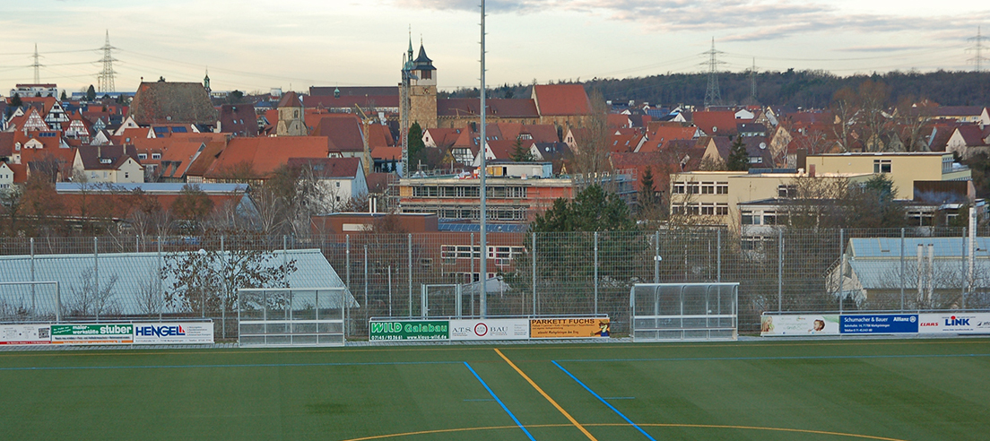 Markgröningen: Bildungszentrum am Benzberg (von Süden)